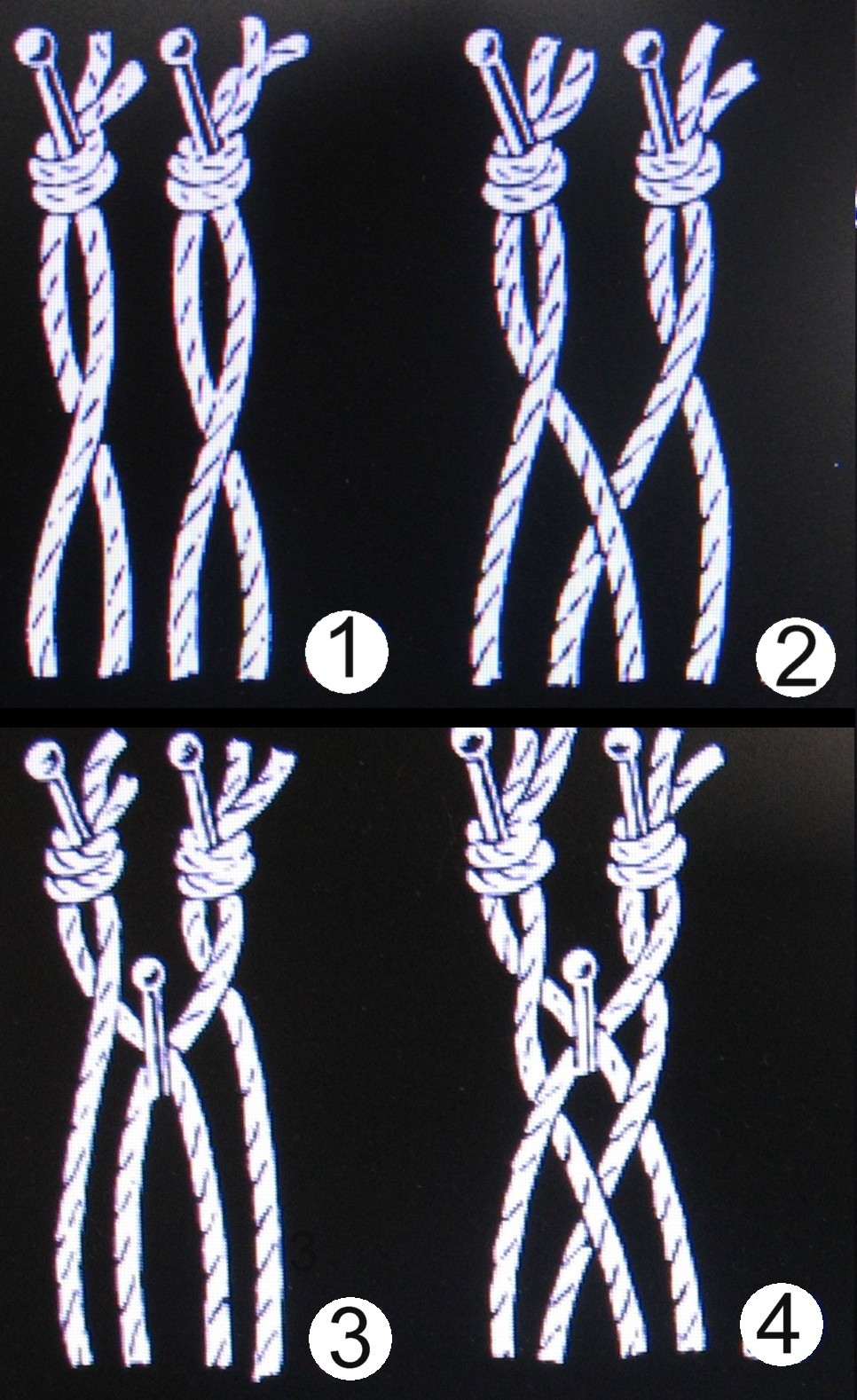 Grundelemente der Klöppeltechnik